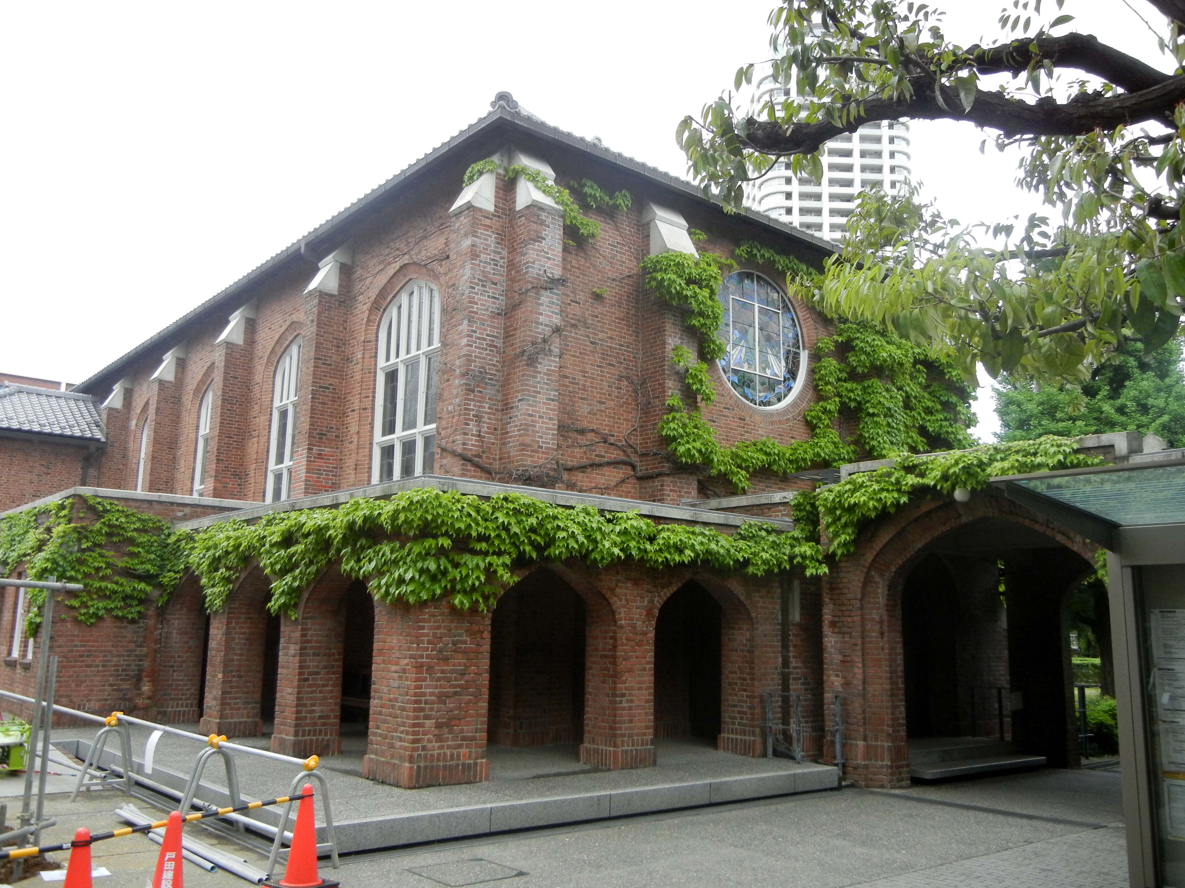 立教学院諸聖徒礼拝堂